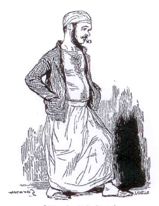 Type carnavalesque parisien dessiné par Gavarni.